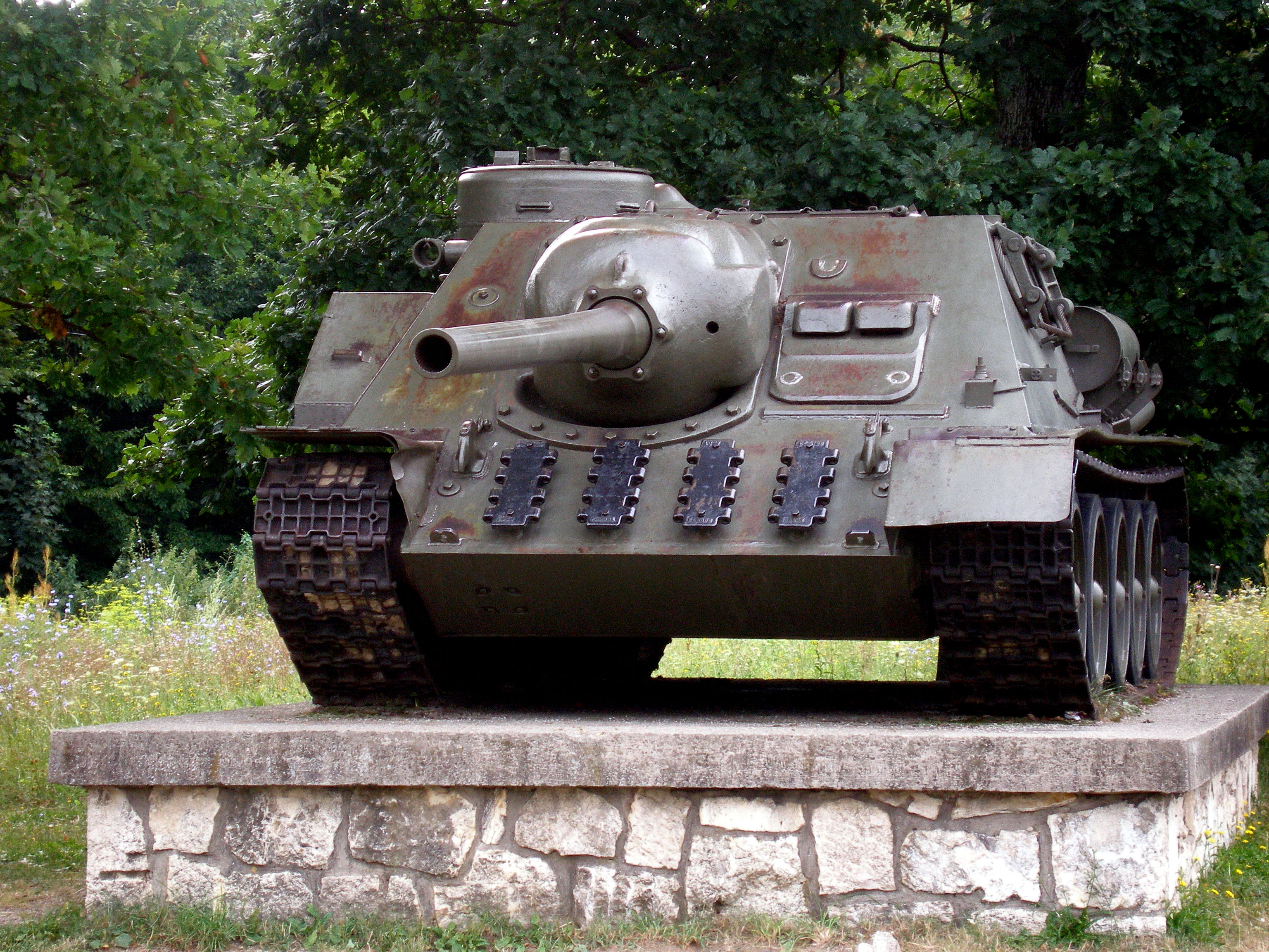 Vojenský pamätník obetiam Druhej svetovej vojny na Dargove,okr.Košice-okolie